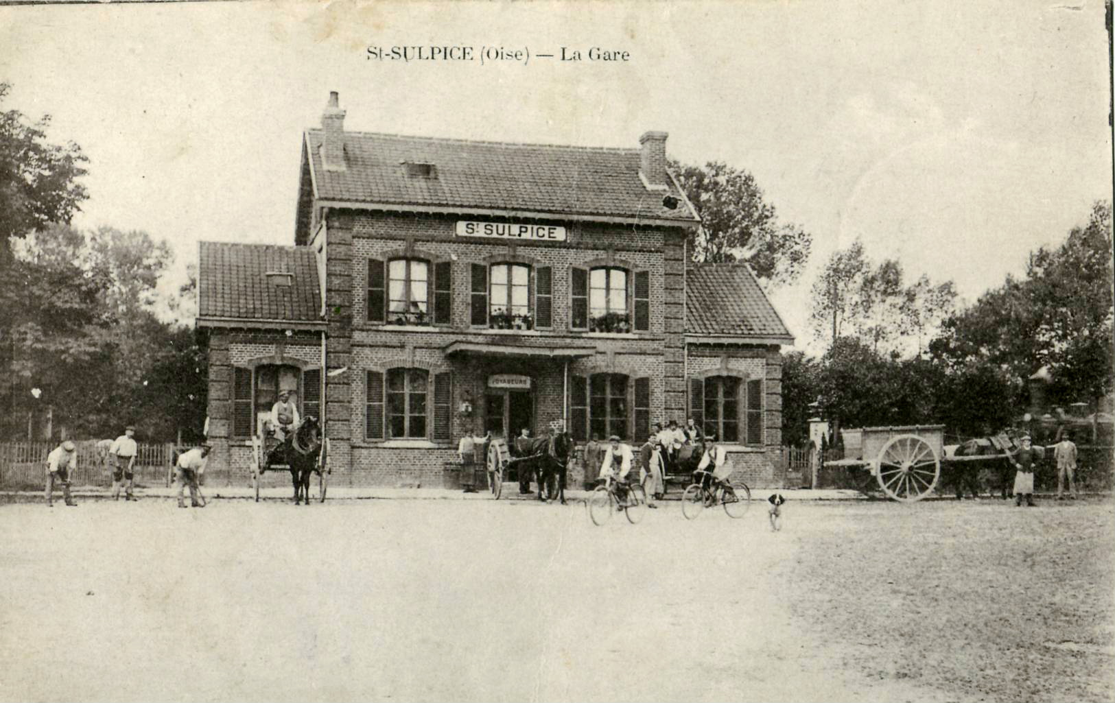 carte postale ancienne éditée par Bréger : SAINT-SULPICE - La Gare